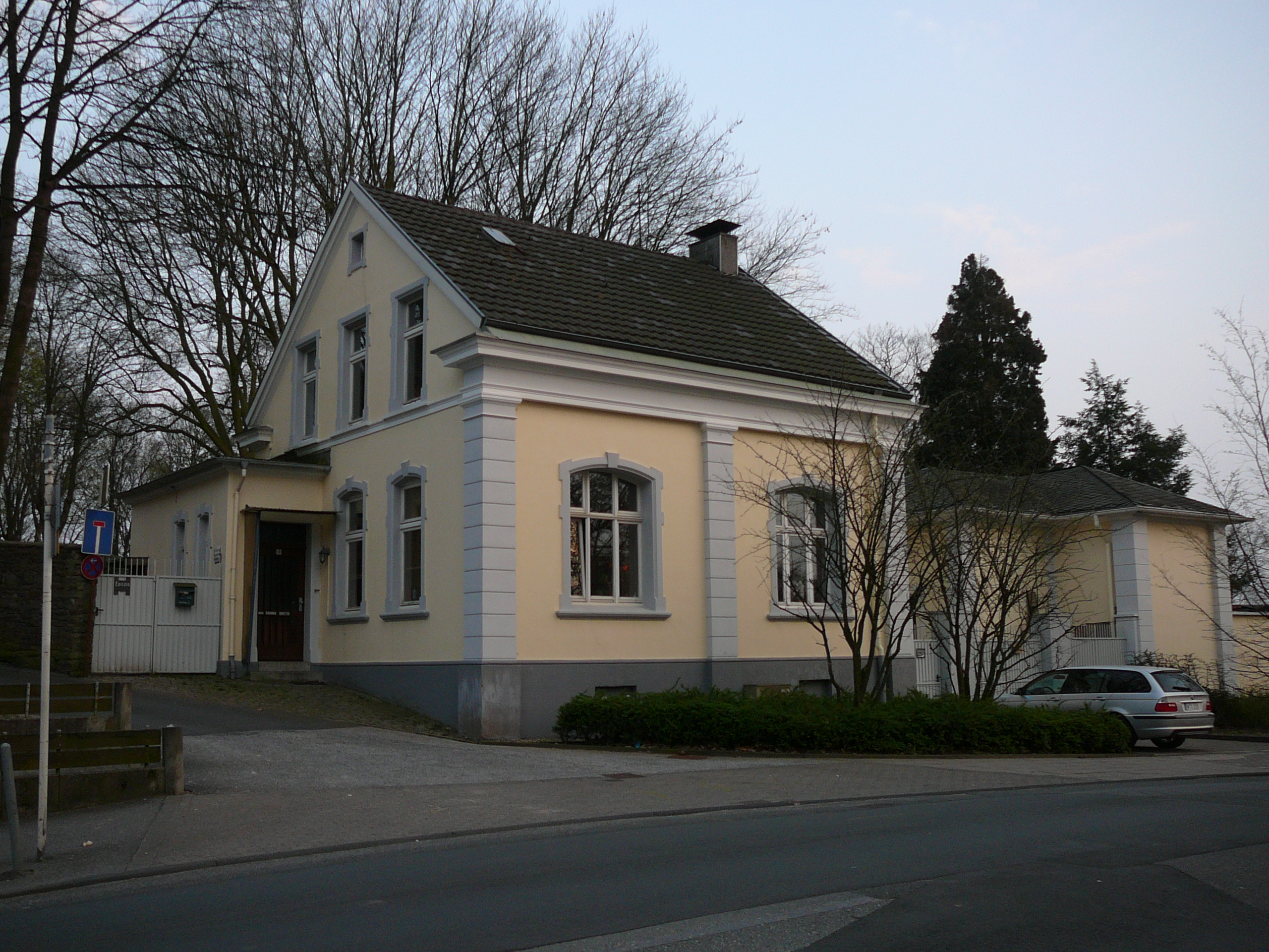 Am Weinberg, Wuppertal